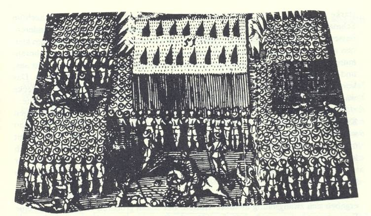 Tercio nach in einem Kupferstich von Merian